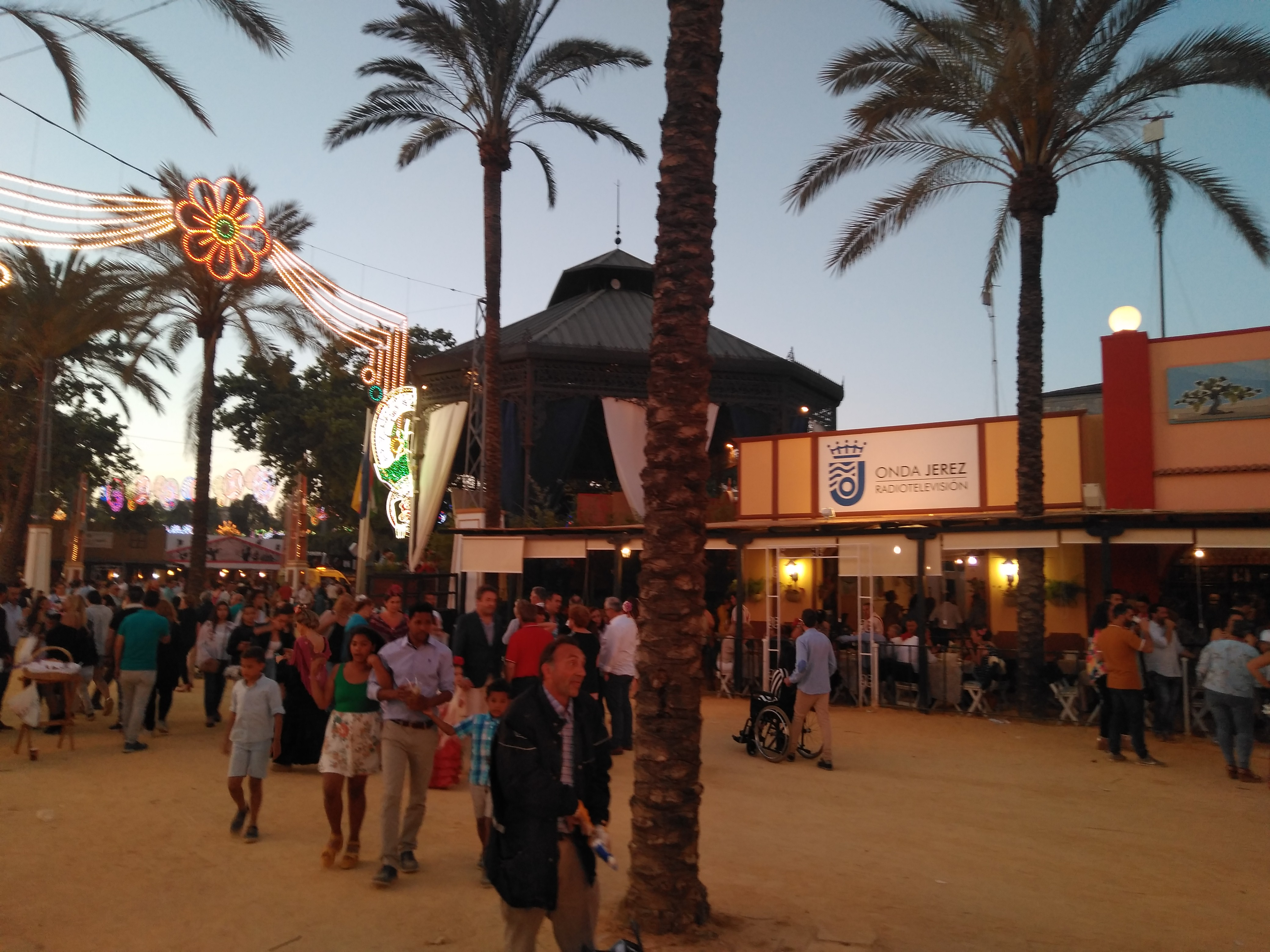 Caseta de Onda Jerez Radiotelevisión en la Feria del Caballo 2019 (Jerez de la Frontera, España)